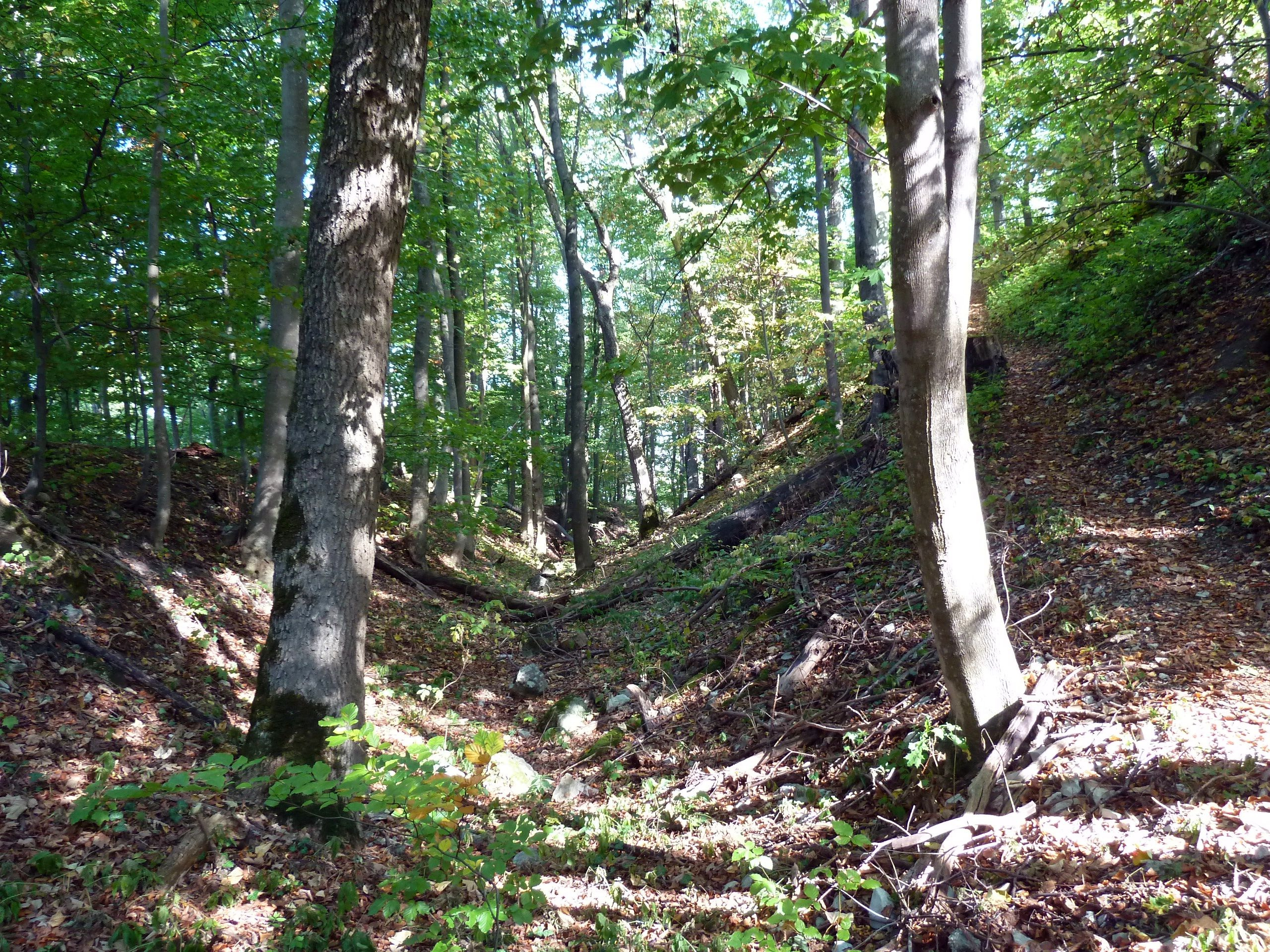 Burg Spitzenberg oberhalb Kuchen: südlicher Wall